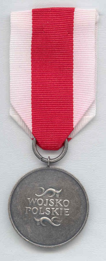 Srebrny Medal „Za zasługi dla obronności kraju“ - rewers (wzór od 1991)